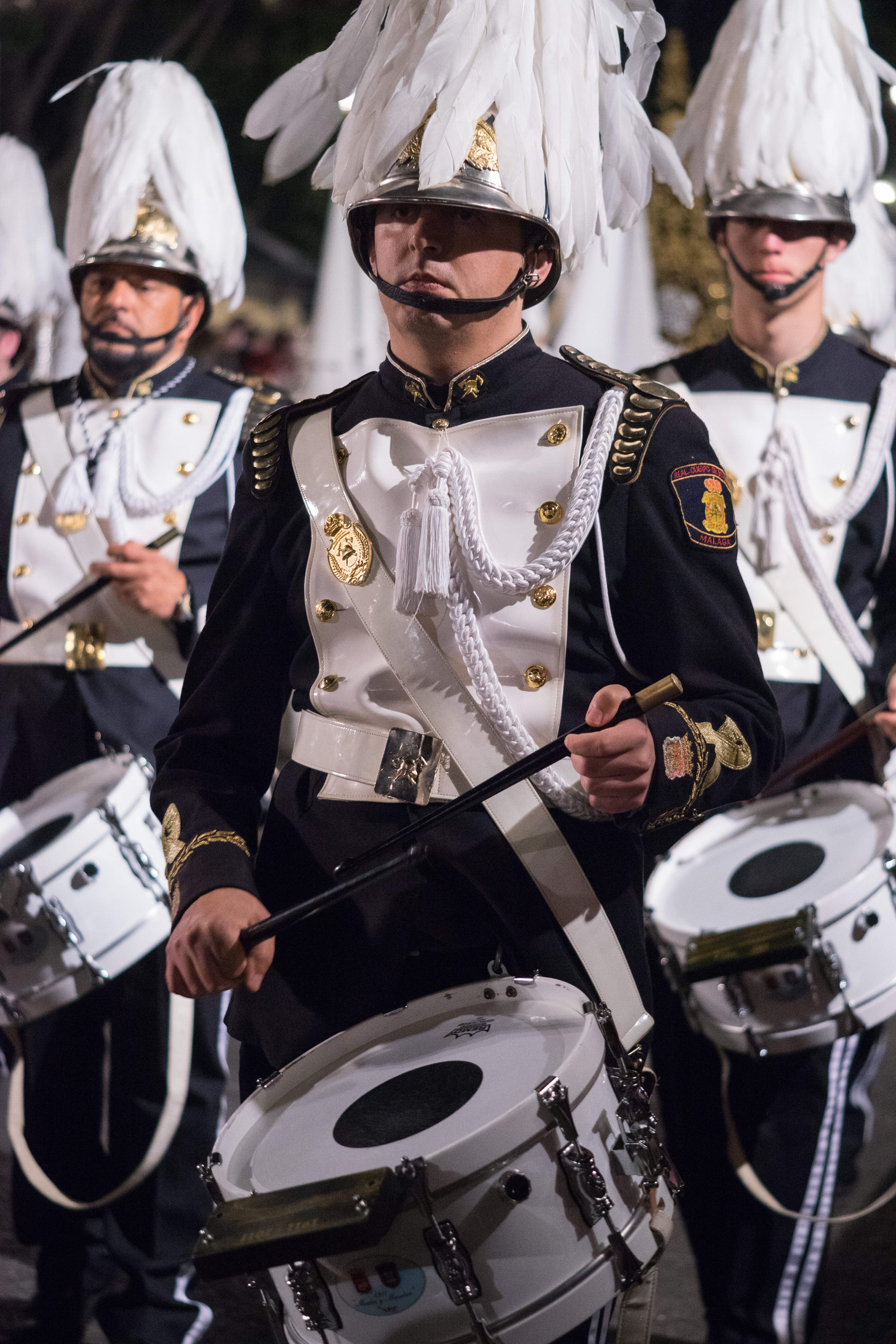 Tambor de la Banda de la Policía Local de Málaga con la Ilustre y Venerable Hermandad de la Orden de Santo Domingo de Guzmán de Nuestro Padre Jesús de la Humillación y Perdón y María Santísima de la Estrella This is a photography of a Folklore festival in Spain (Wikidata id Q9075883).